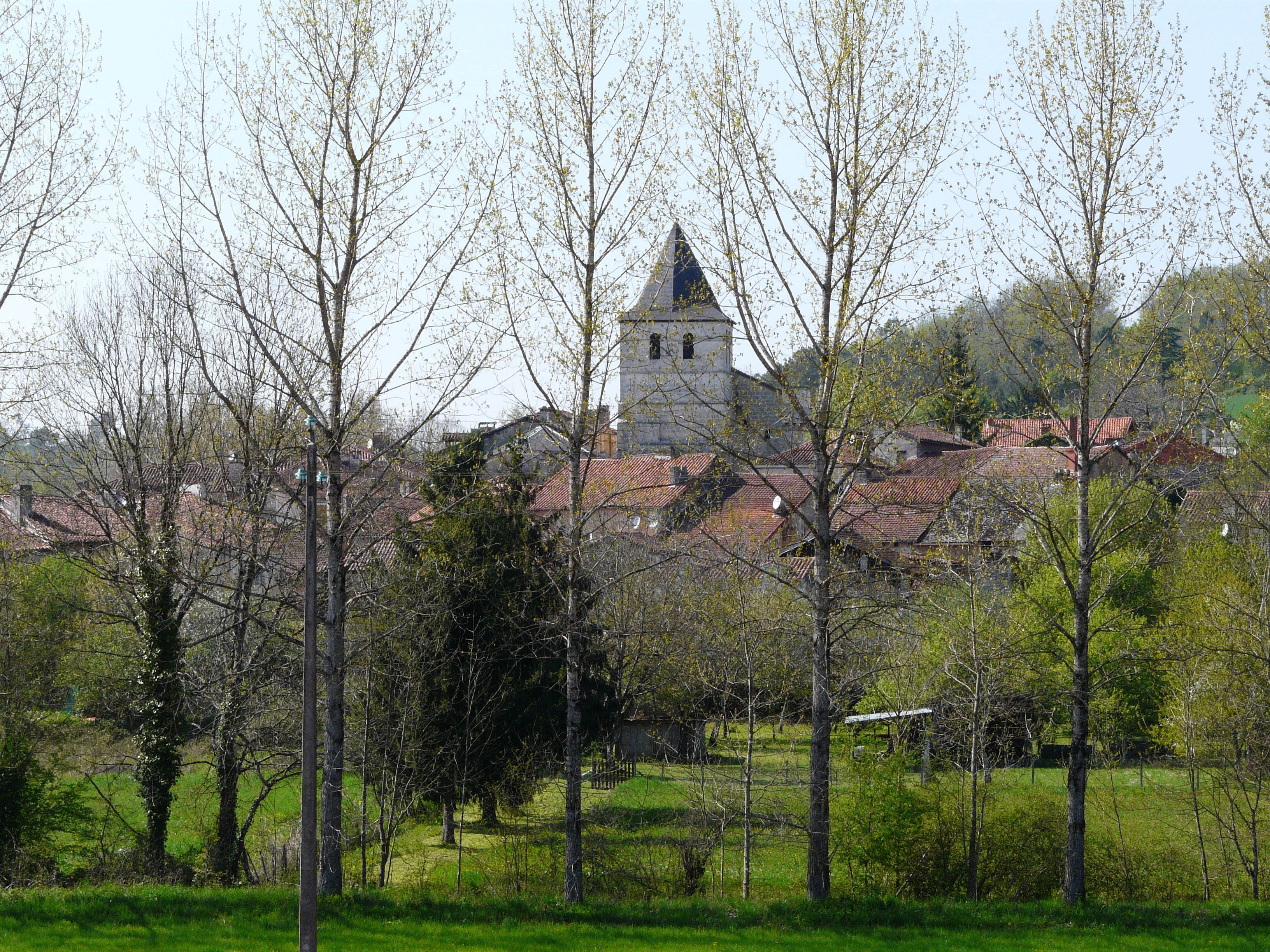 Vue générale du bourg de Villars, Dordogne, France